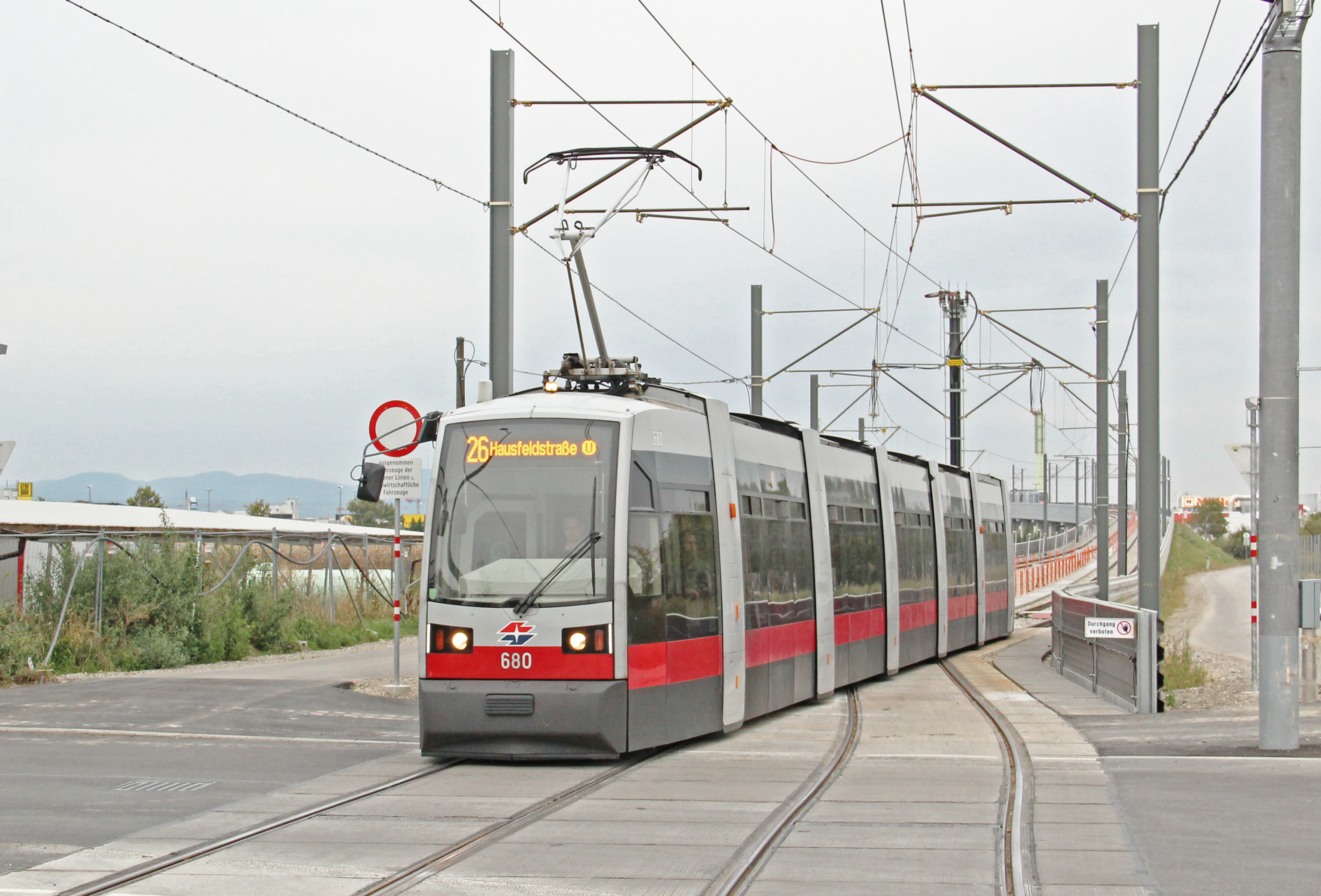 Hier, kurz vor der Haltestelle Süßenbrunner Straße, wurde eine Gleiskreuzung eingebaut, da die Hochstrecke im Linksverkehr befahren wird.